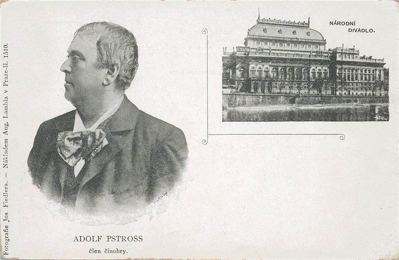 Adolf Pštross/Pstross (15. 1. 1851 – 11. 3. 1903), český herec, člen ND